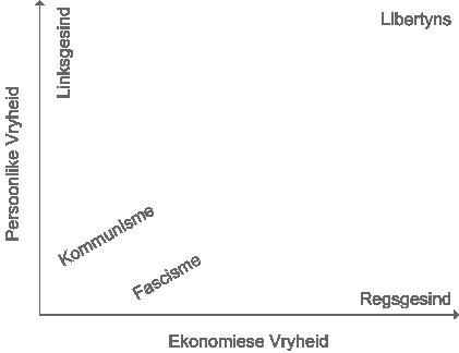 Terwyl die tradisionele politiese spektrum as 'n reguit lyn gesien word, maak die Nolan kaart voorsiening vir libertyne en ander deur dit as 'n vlak uit te druk.